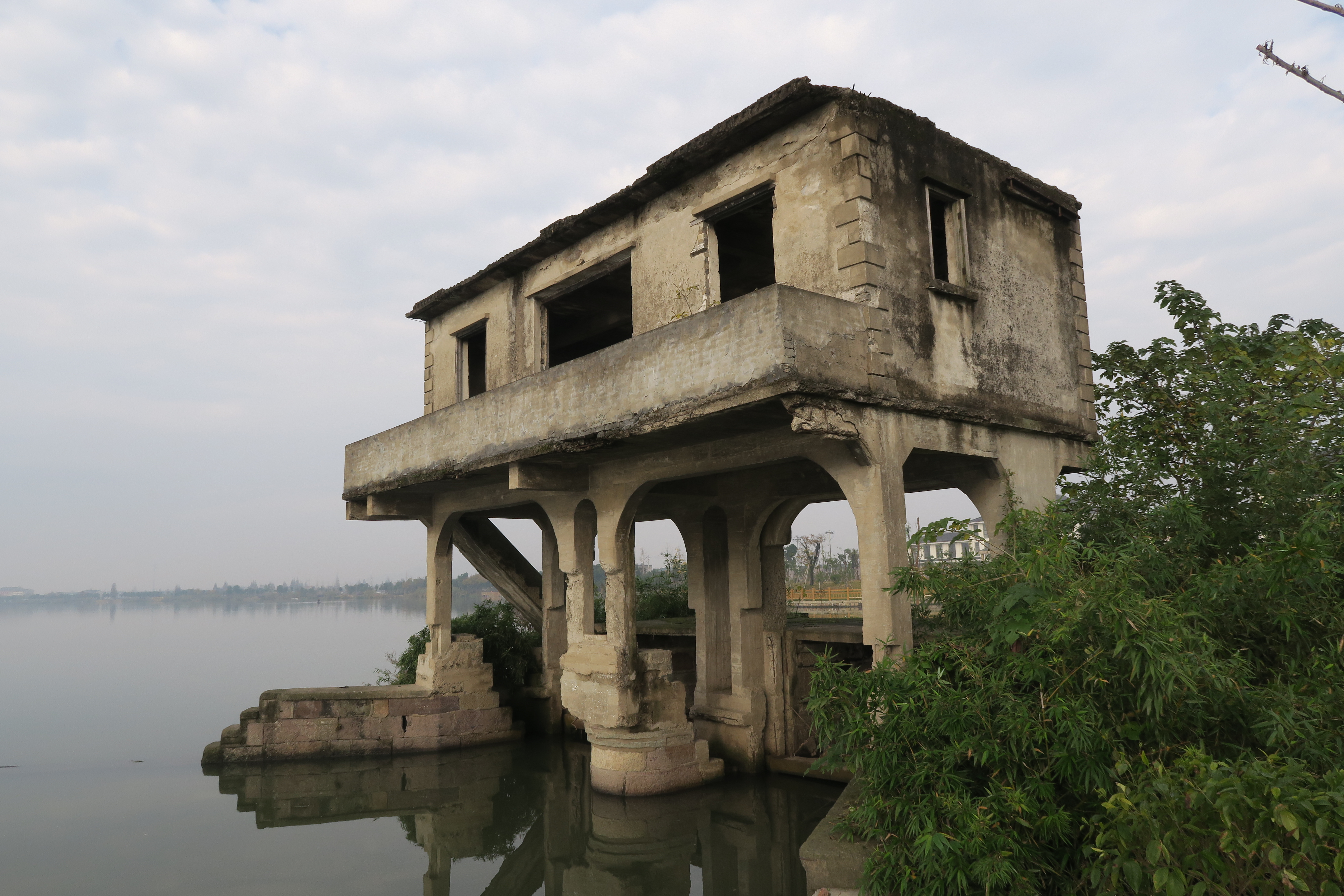 官山河小西坝